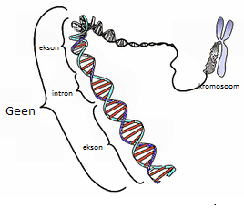 Eukarüootse DNA segmendi kodeeriv regioon